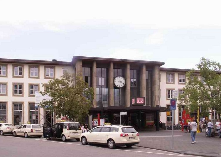 Fotograf . ich selbst M.B.